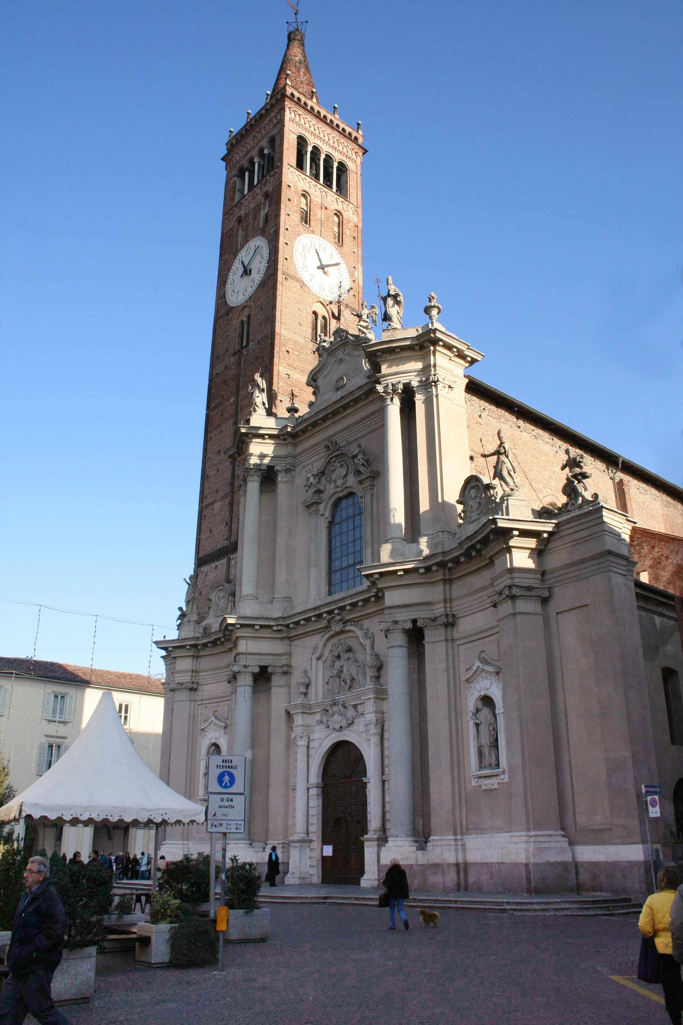 Treviglio, parrocchiale San Martino.